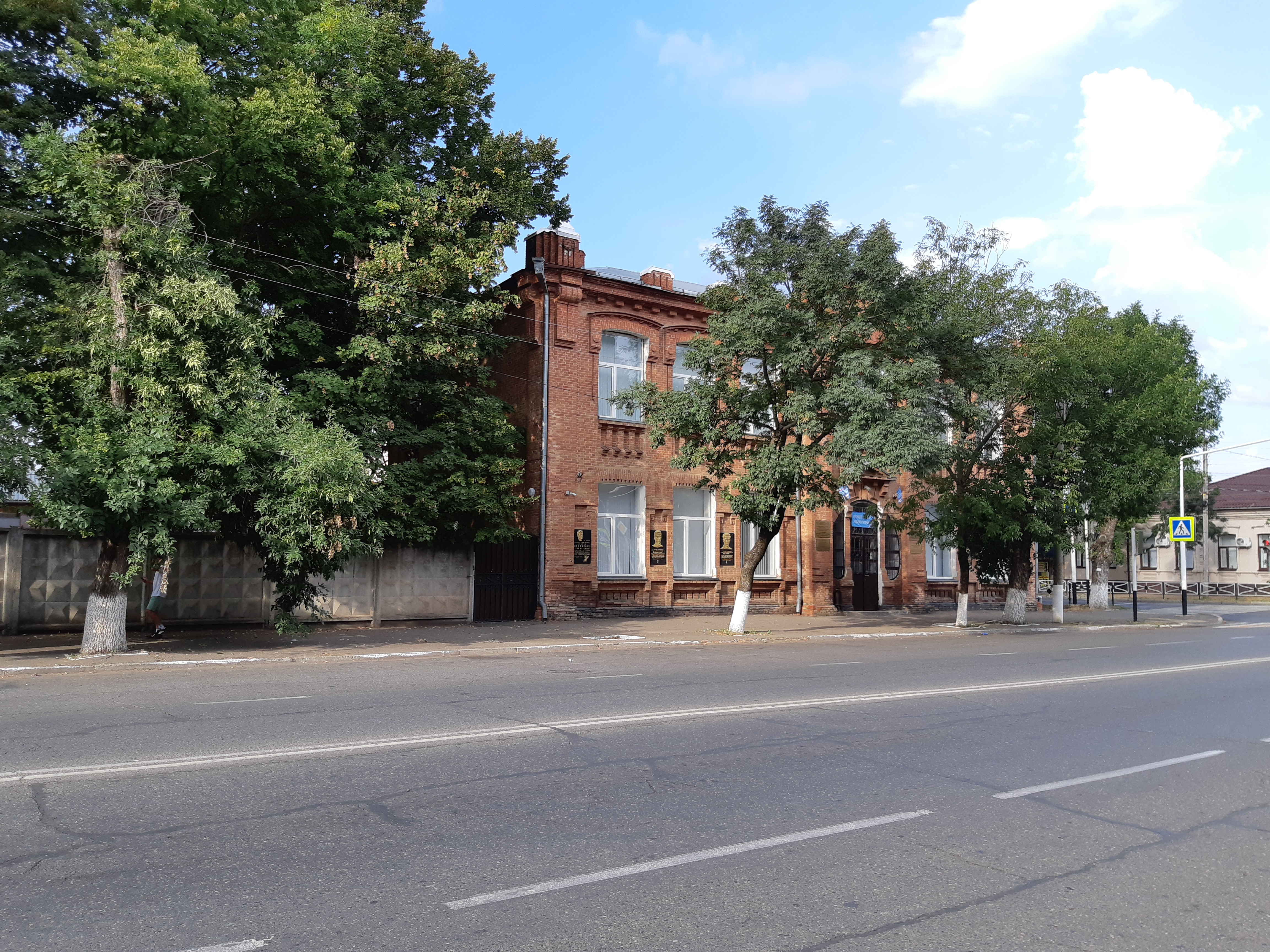 Гимназия (педучилище): улица Гагарина, 35 / улица Советская, 168-170, Майкоп, Адыгея